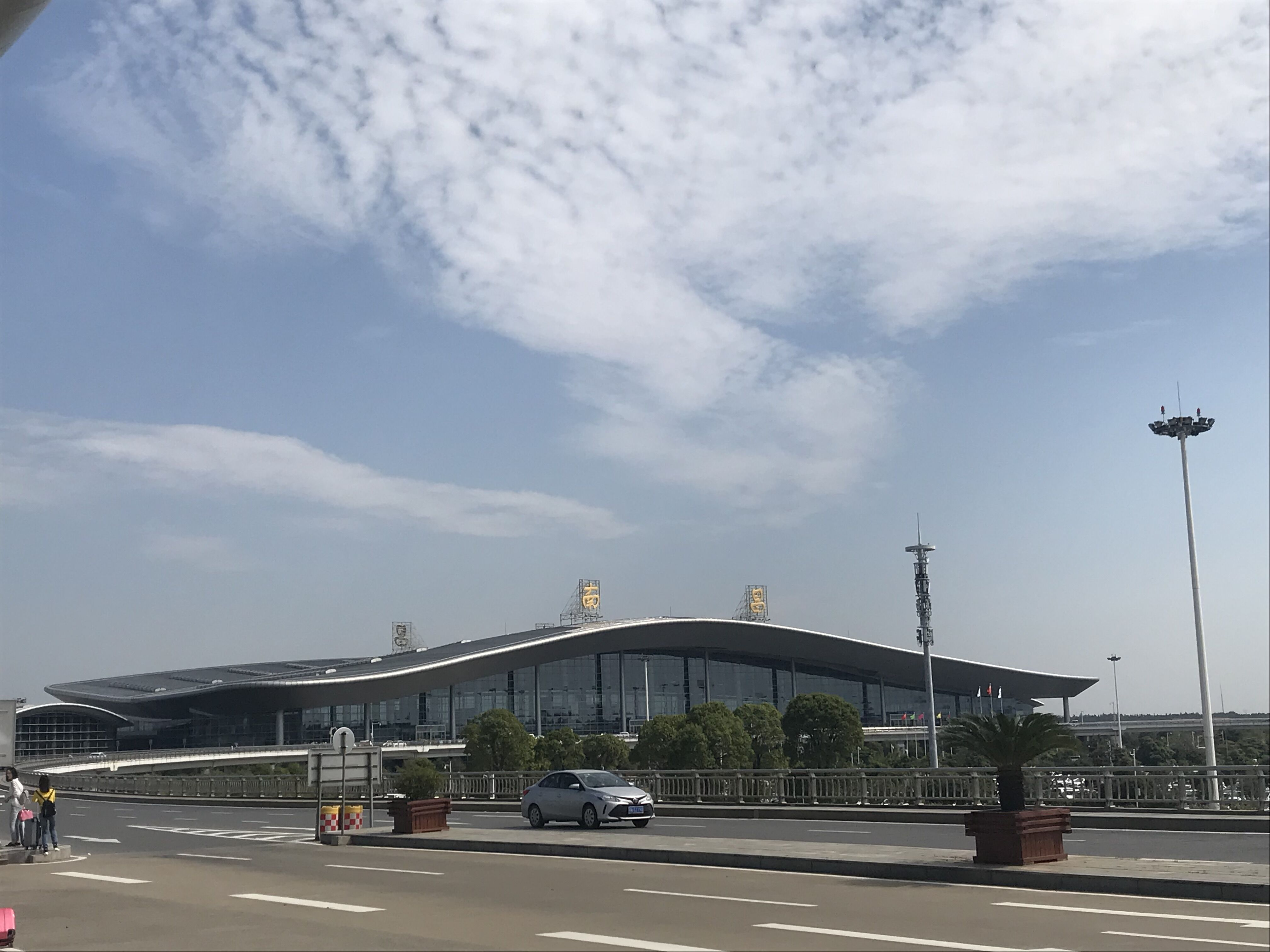 南昌昌北国际机场T2航站楼